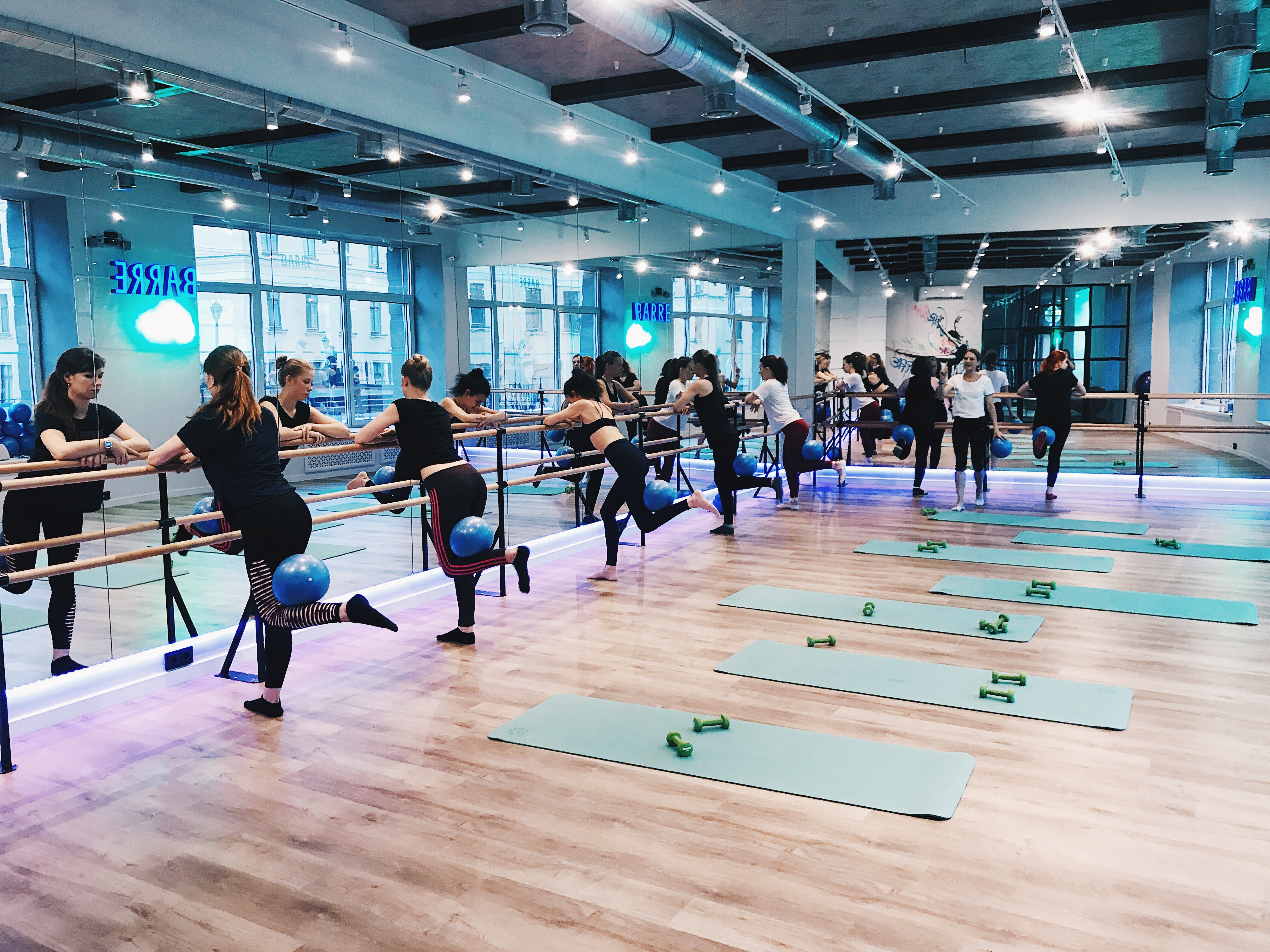 Фото тренировки barre, студия Barre One, Санкт-Петербург, 2018 г.